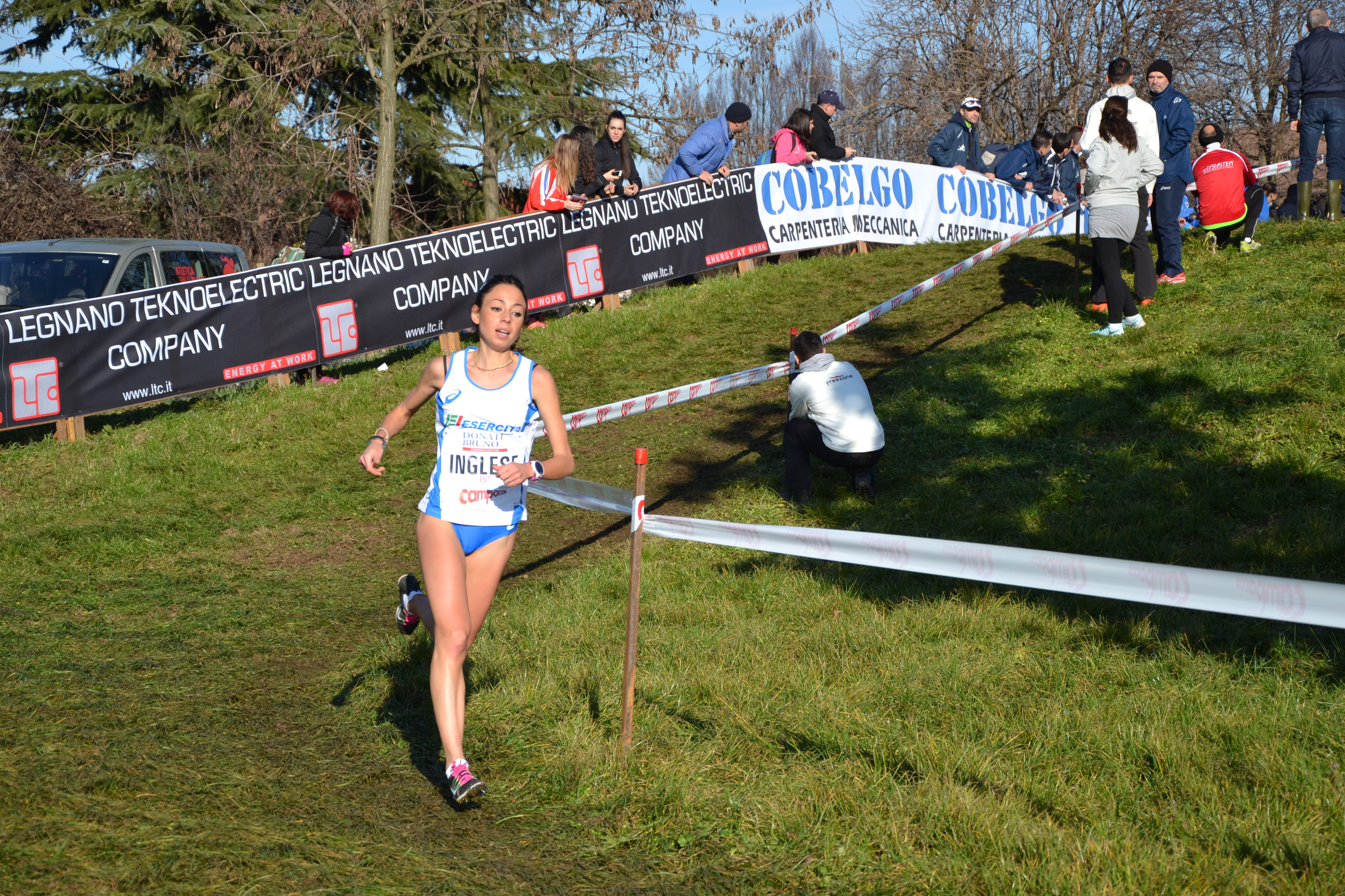 59º Cross del Campaccio. San Giorgio su Legnano, 6 gennaio 2016 Attribuzione: Lucia Moretti / A.S.D. Polisportiva Olonia / CC-BY-SA